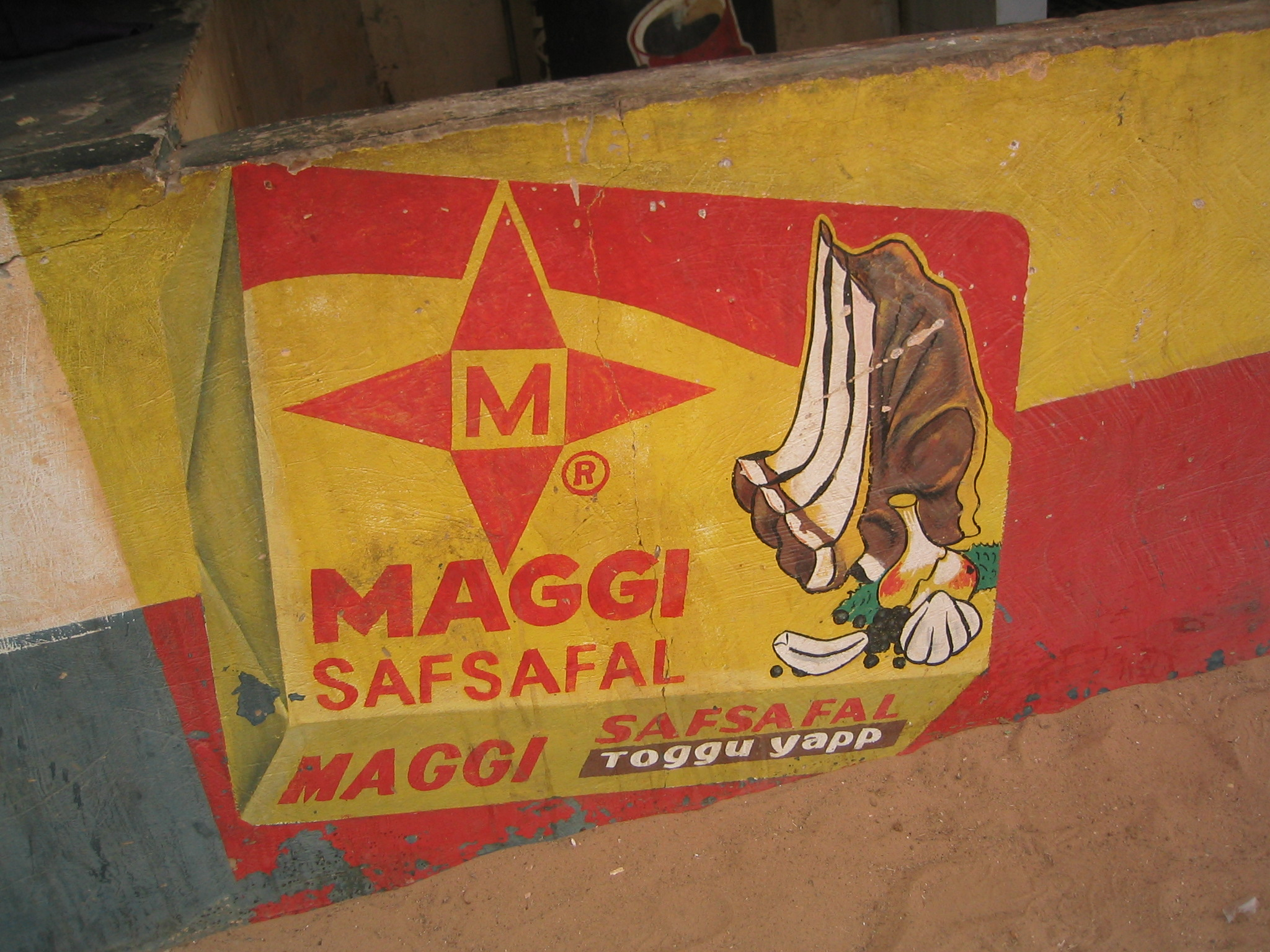 Publicité Maggi Safsafal peinte sur un mur à Meckhe (Sénégal)